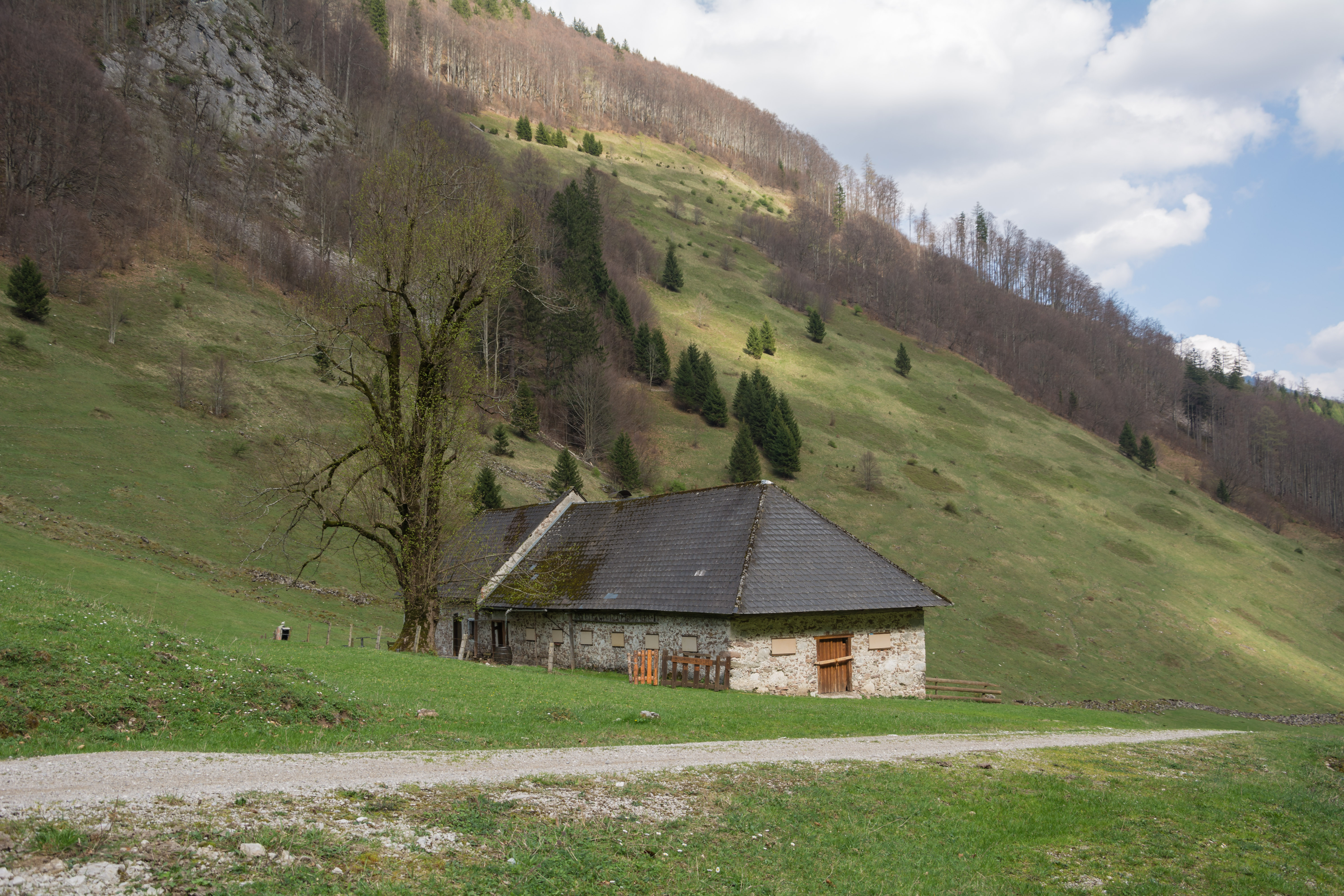 Das Almhaus auf der Blumauer Alm wurde von der Familie Zeitlinger (Sensenschmiedebesitzer) 1849 errichtet. This file shows the National Park Kalkalpen in Austria.